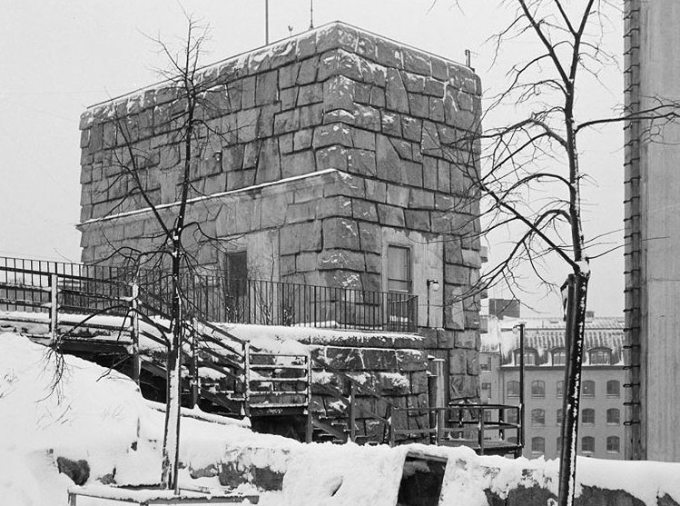 Kungsklippan. Byggnad vid Stadsarkivet